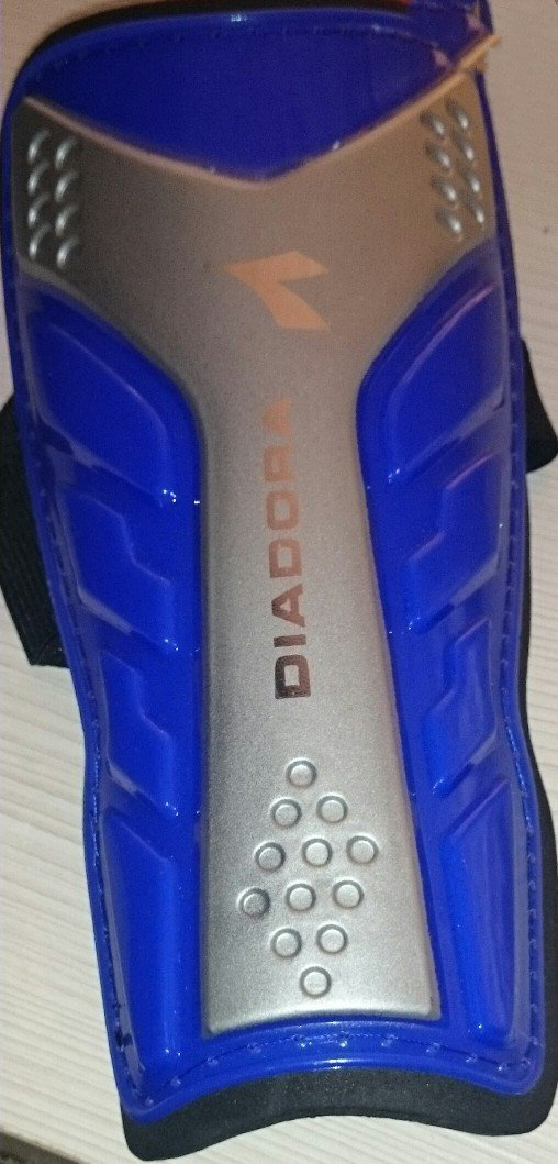 Futbol oynayarkən ayağ qoruyucusu